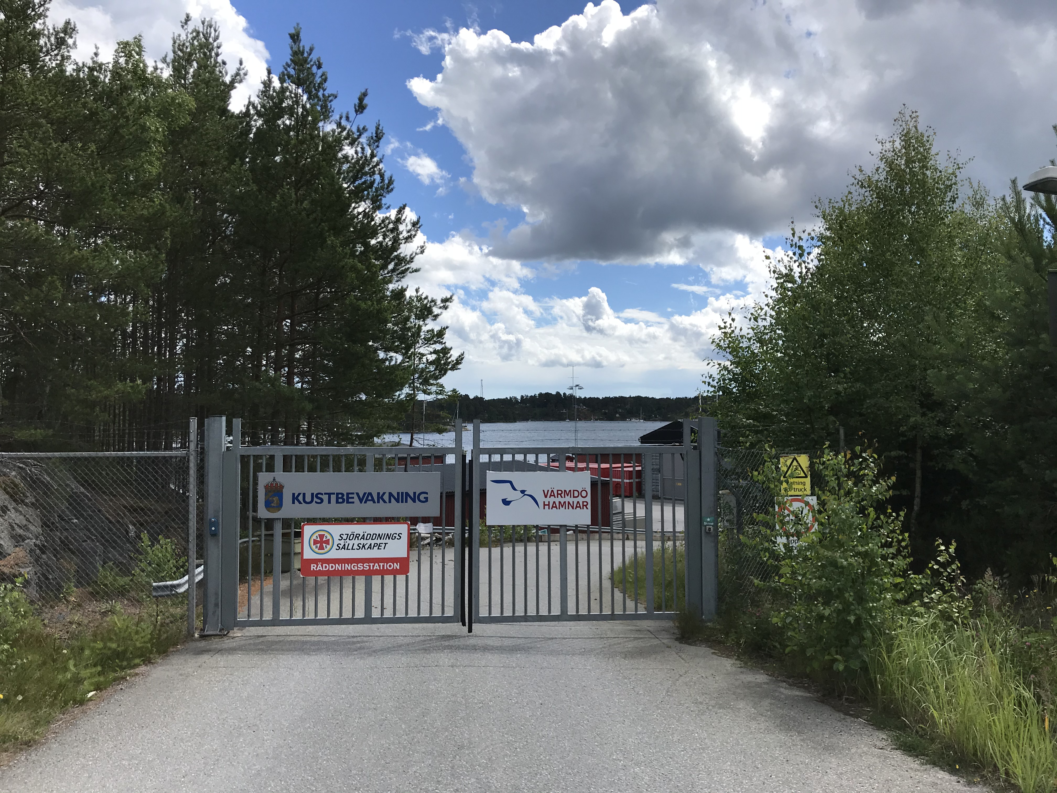 Ingång till Djurö hamn på Värmdö, där Värmdö Hamnar hyr ut lokaler och båtplatser till bland andra myndigheter som Kustbevakningen, Sjöräddningssällskapet, Storstockholms Brandförsvar och Sjöpolisen samt också till olika företag.